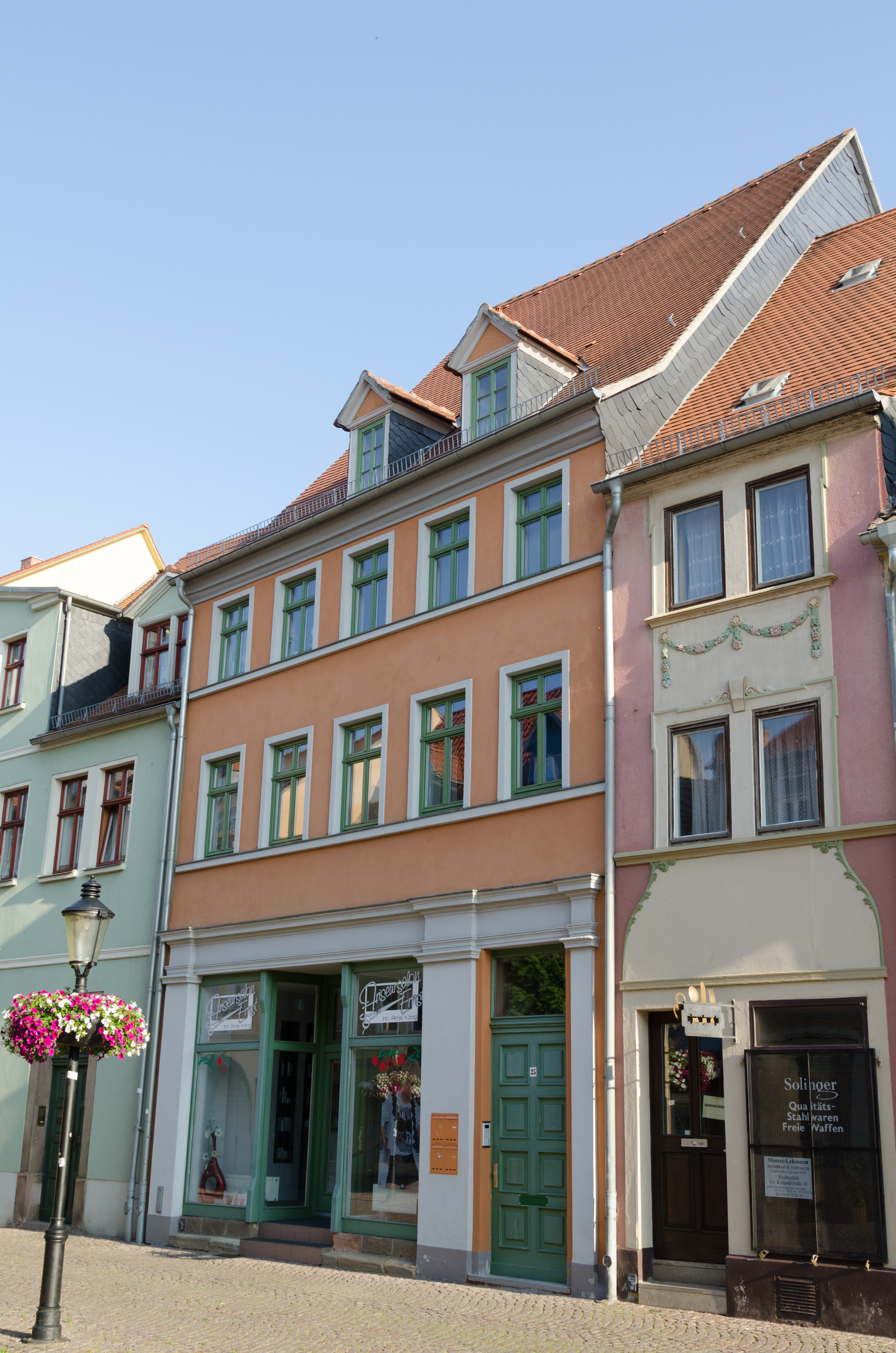 Naumburg, Salzstraße 25